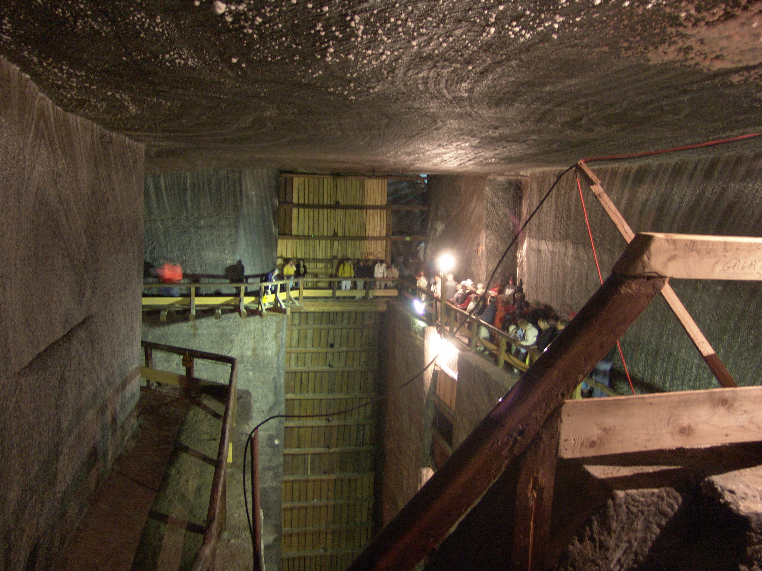 Een foto genomen in een mijn in Roemenië, tijdens een rondleiding.